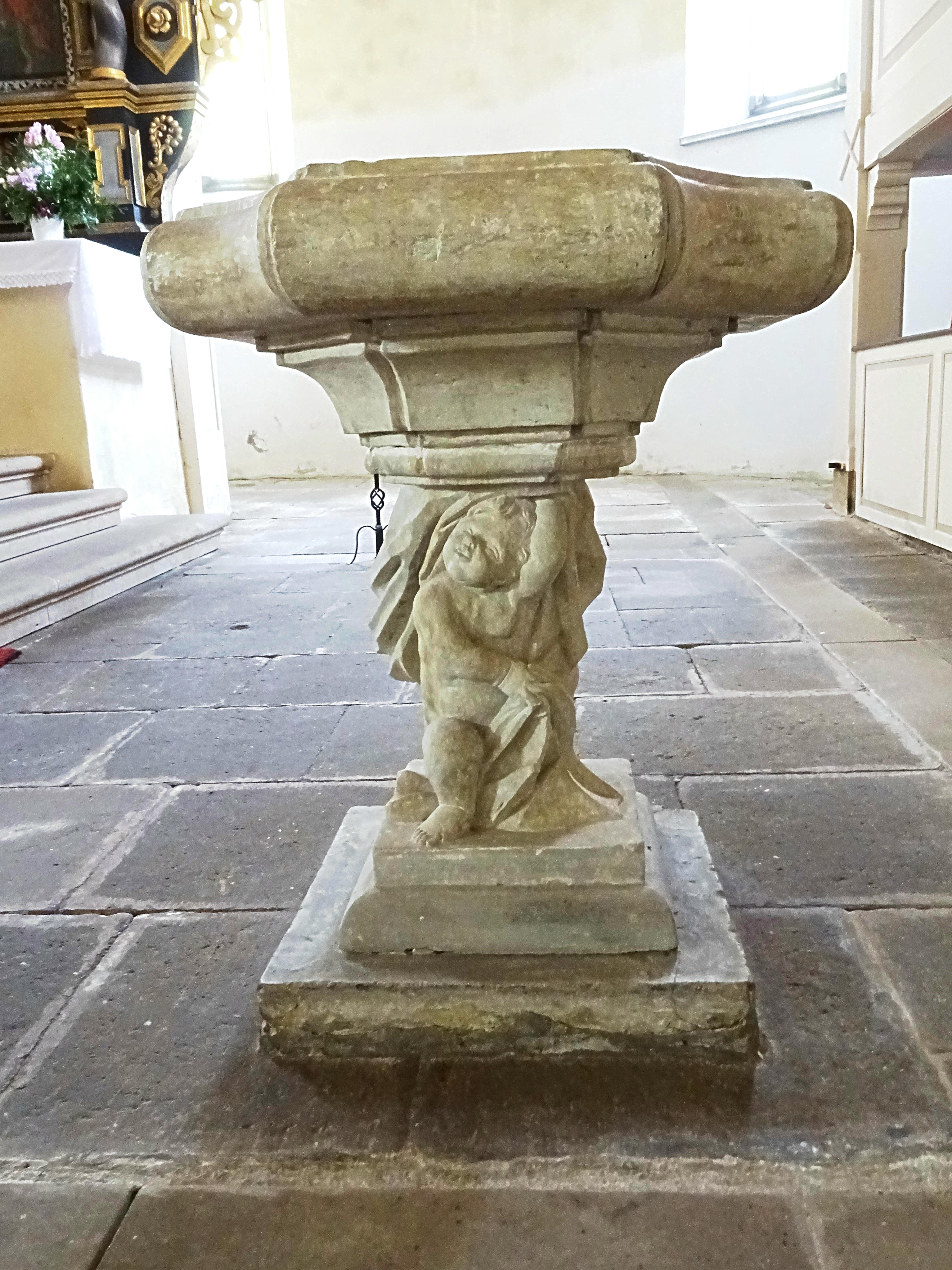 Geising: die evangelisch-lutherische Stadtkirche, Schon seit dem 15. Jahrhundert befindet sich am Ort der Geisinger Kirche eine Pfarrkirche. 1689 wurde sie als barocke, schlichte Hallenkirche mit dreistöckigen Emporen neu erbaut. Der taufstein.